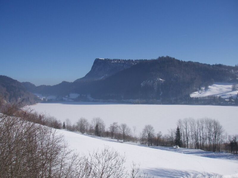 Blick von Les Charbonnières über den zugefrorenen Lac Brenet zur Dent de Vaulion